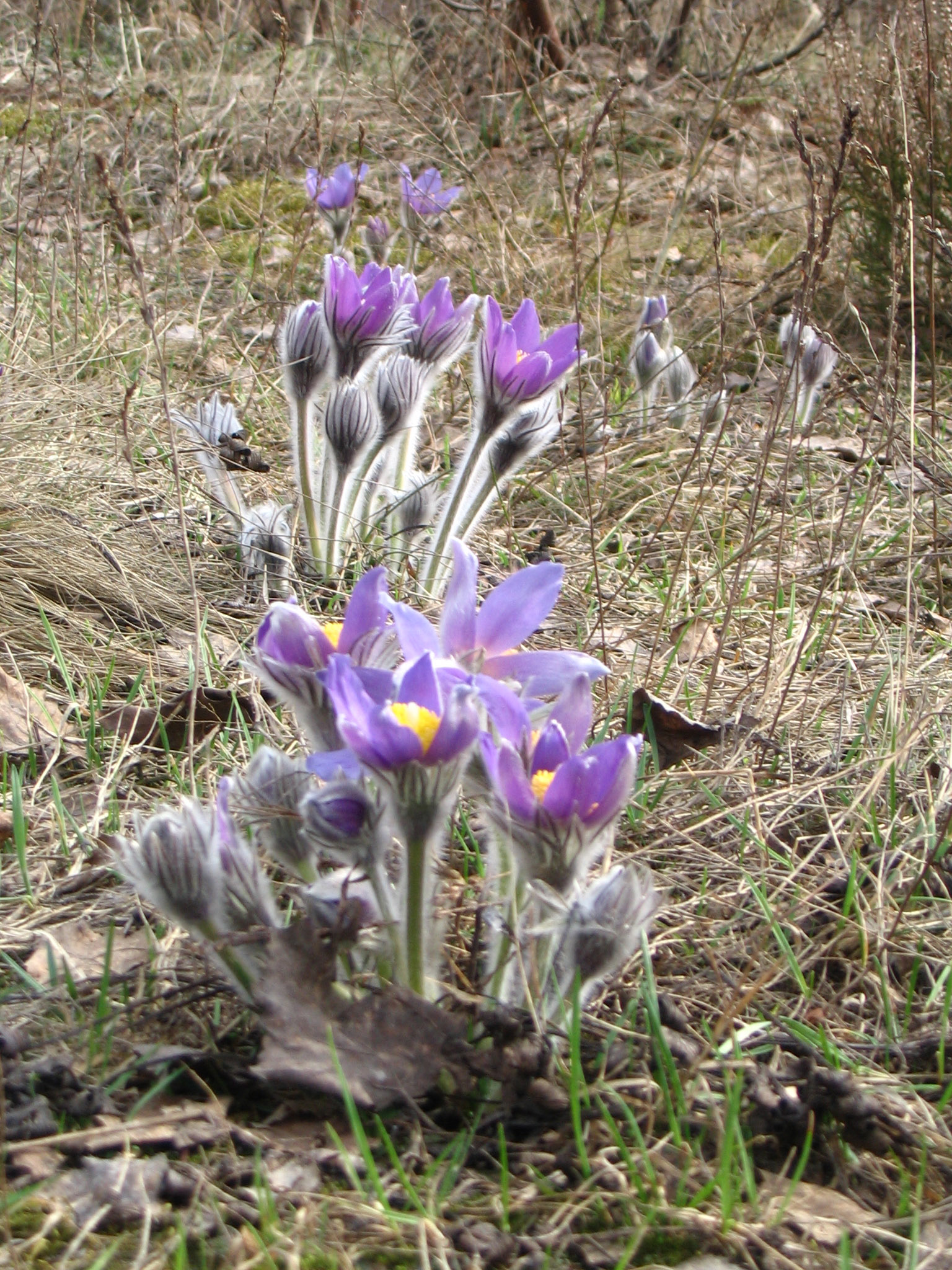 Pulsatilla patens in Belarus